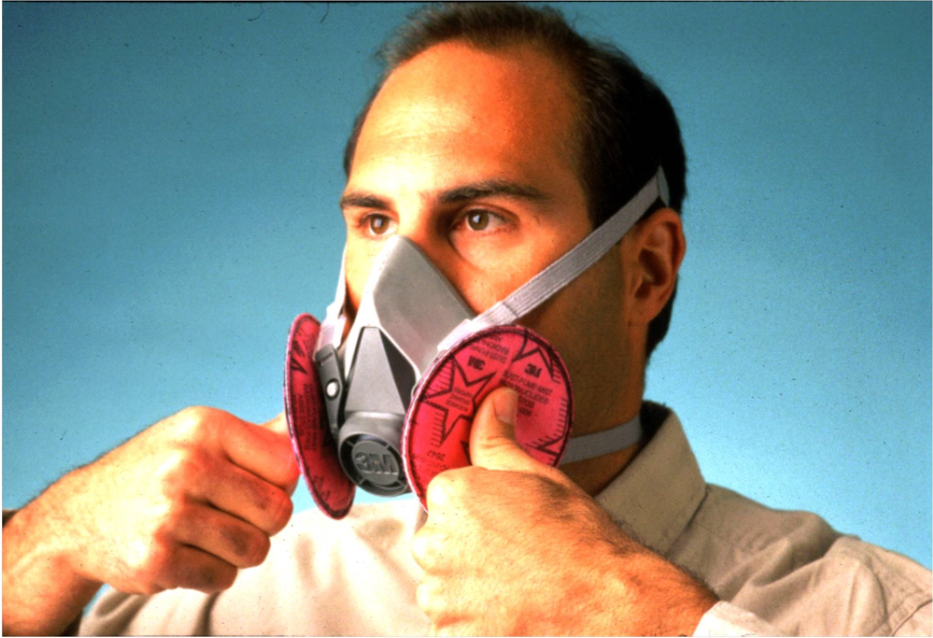 Проверка правильности одевания эластомерной полумаски 3М серия 6000 разрежением